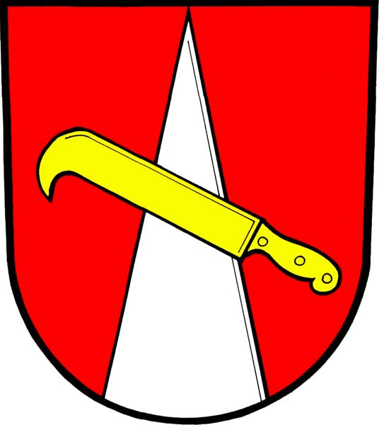 Znak obce Pravčice